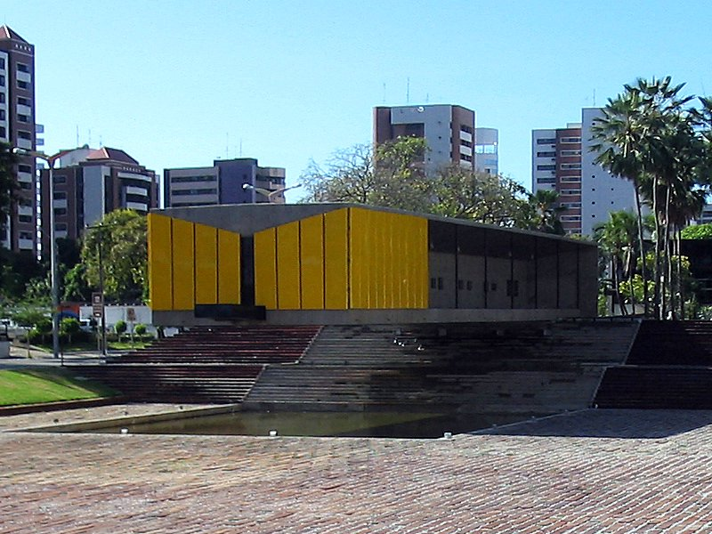 Mausoleo do presidente Castelo Branco na cidade de Fortaleza